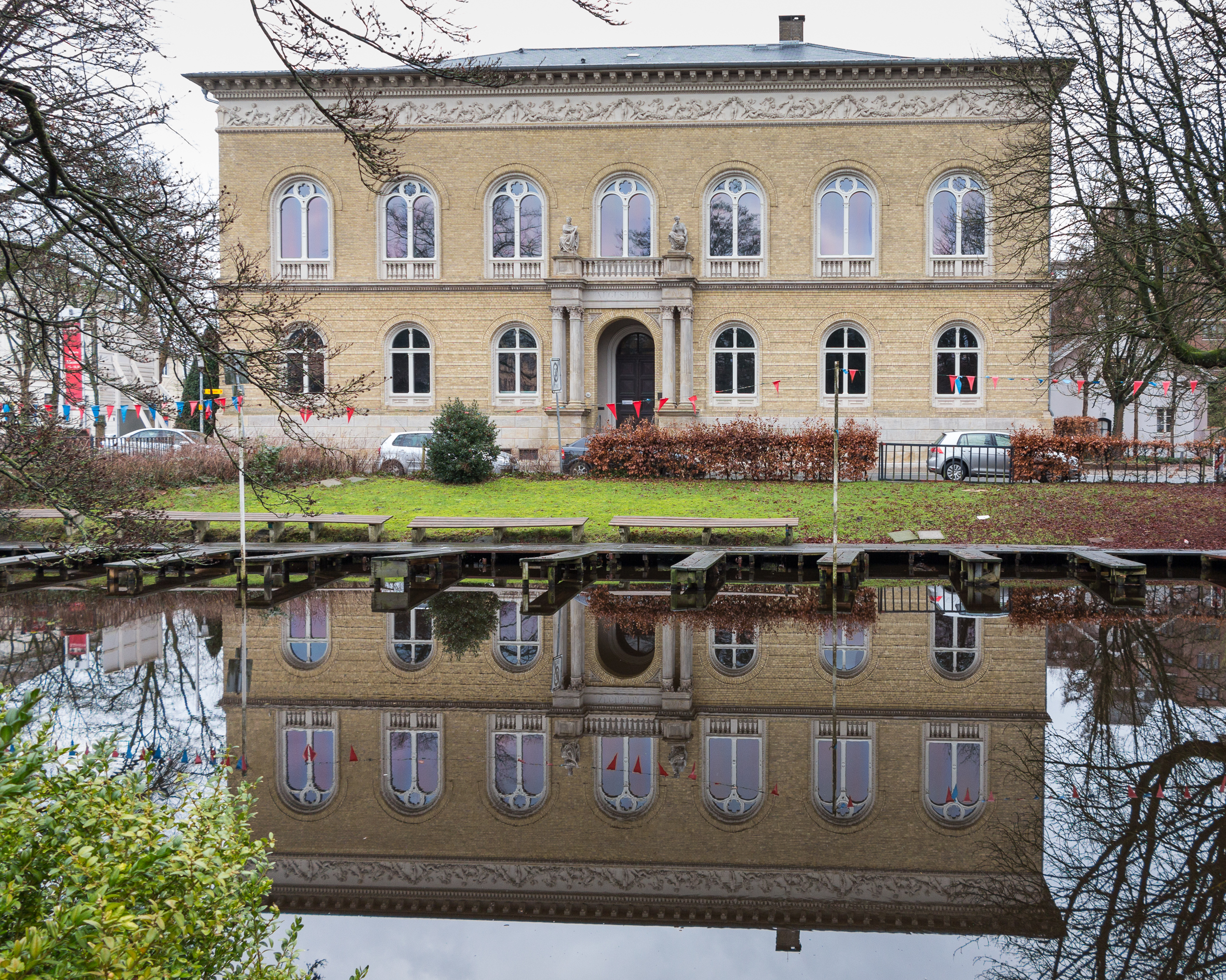 Oldenburg (Oldb): "Augusteum" und Alte Hunte mit winterlich leeren Tretbootliegeplätzen. 1865-67 nach Plänen von E. Klingenberg errichtetes Gebäude für eine der frühen öffentlichen Gemäldegalerien in Deutschland.